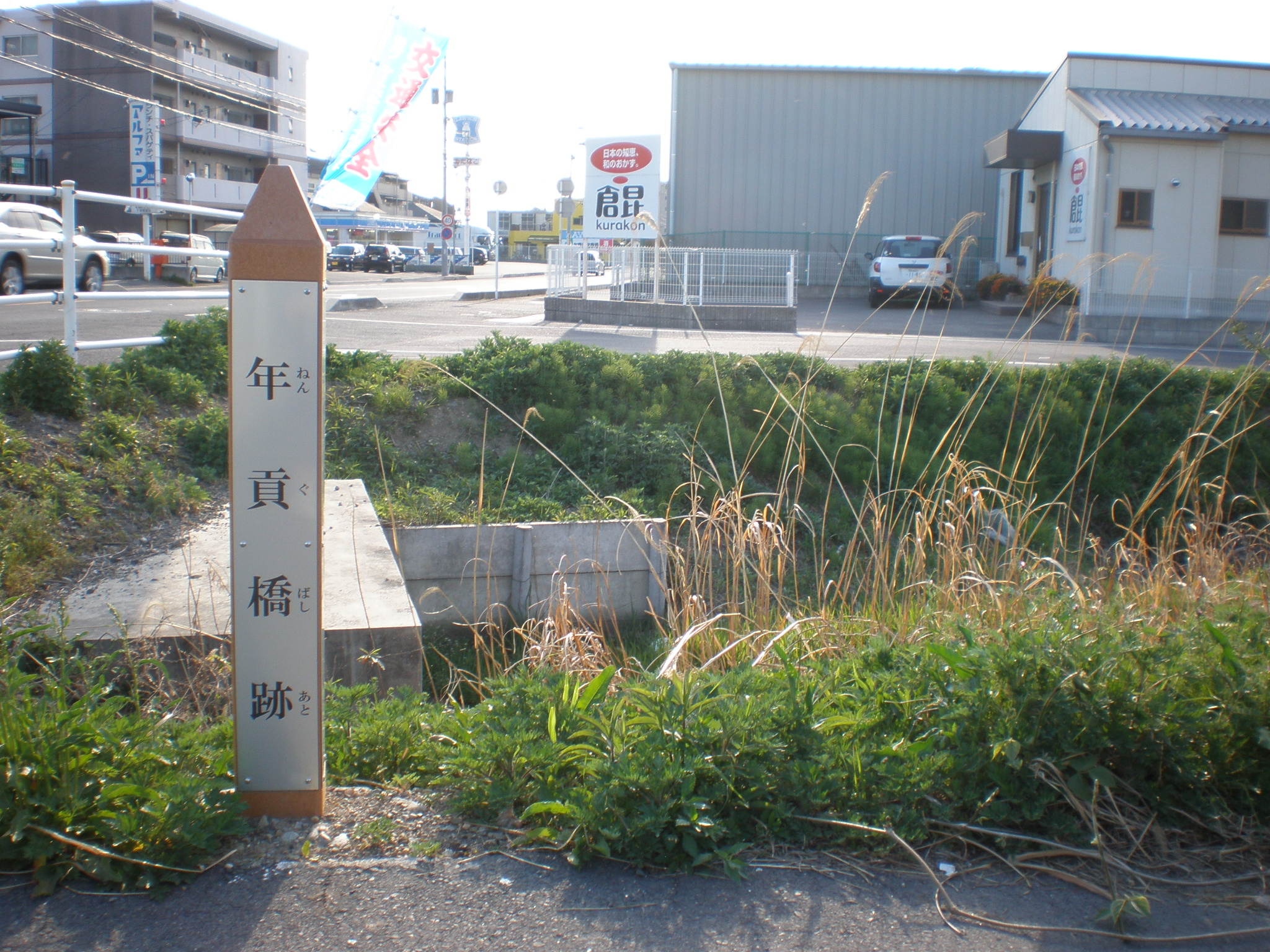 かつて年貢橋がかかっていた場所（愛知県小牧市）